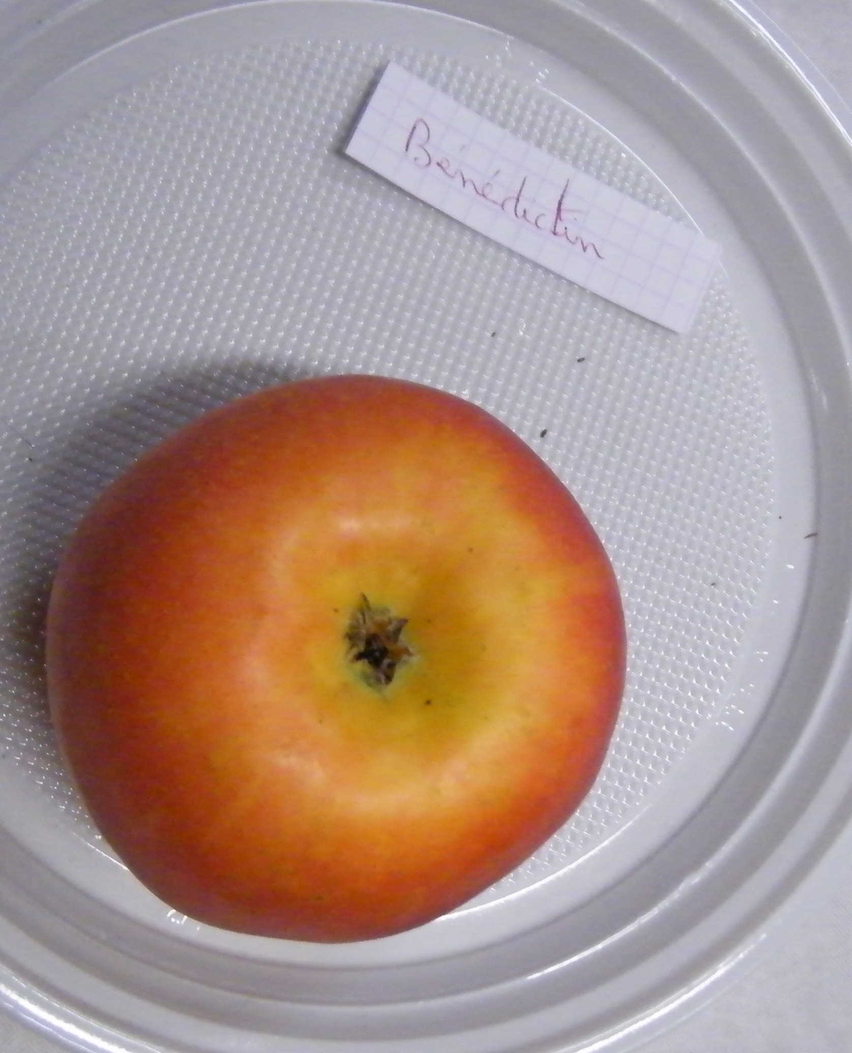 Bénédictin, variété de pomme, Mons-Boubert, Somme, Fr.